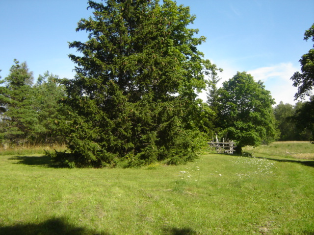 Linnuse siseõu